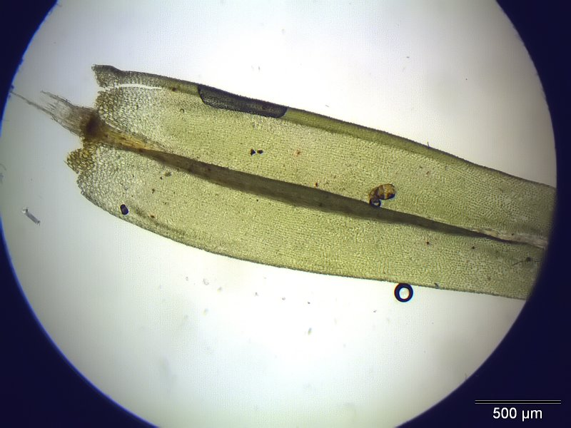 Sumpf-Streifensternmoos (Aulacomnium palustre)